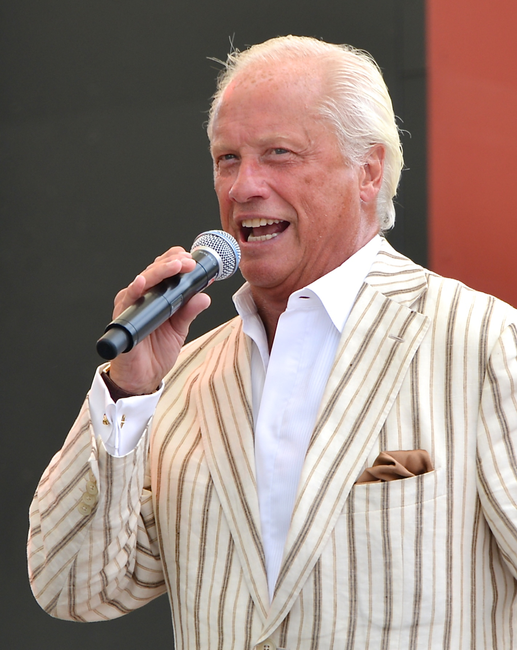 Loa Falkman i Kungsträdgården i Stockholm den 20 juli 2014.